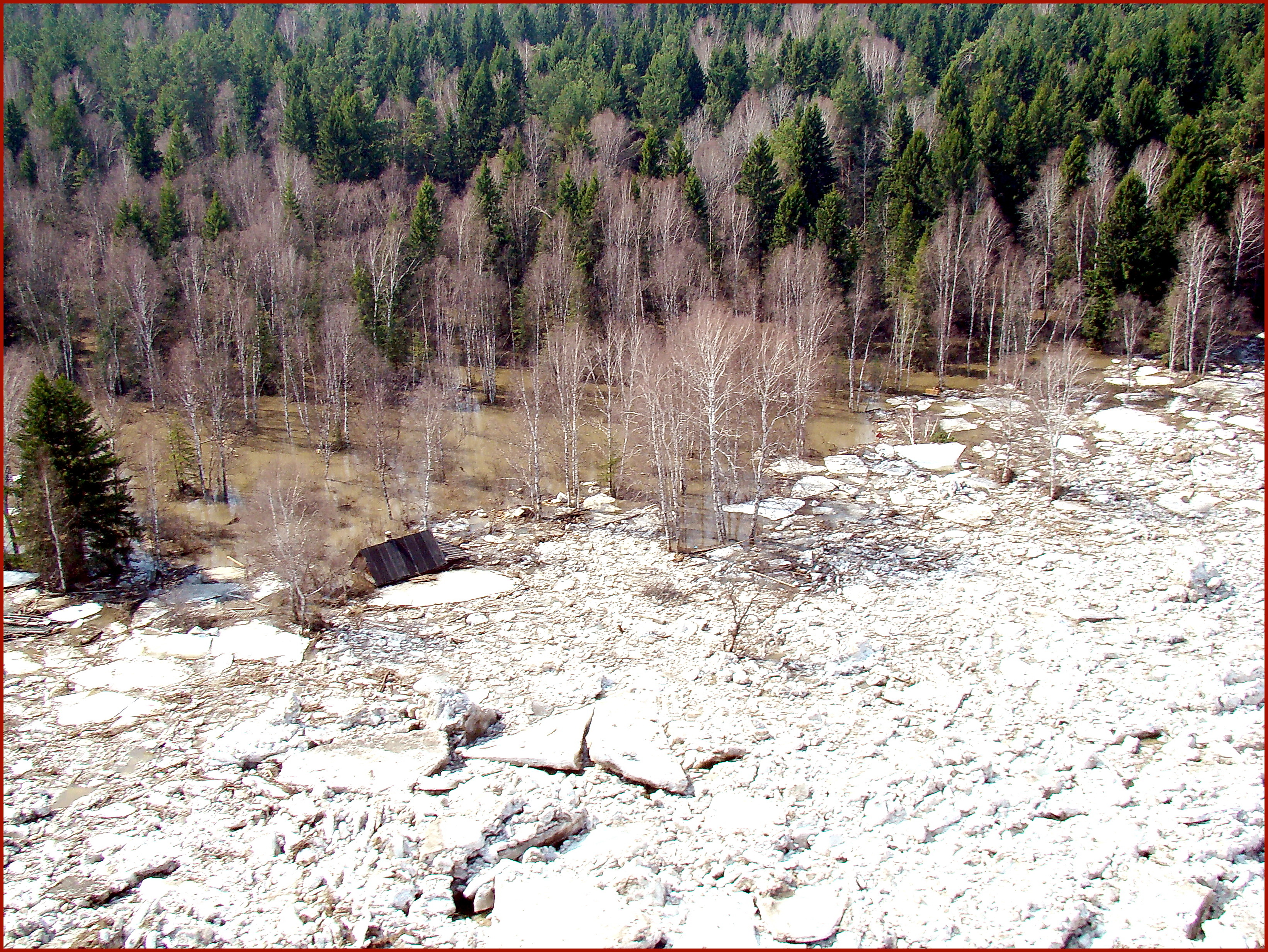 Весна в Западной Сибири. Ледоход на р. Томь, 29 апреля 2010.